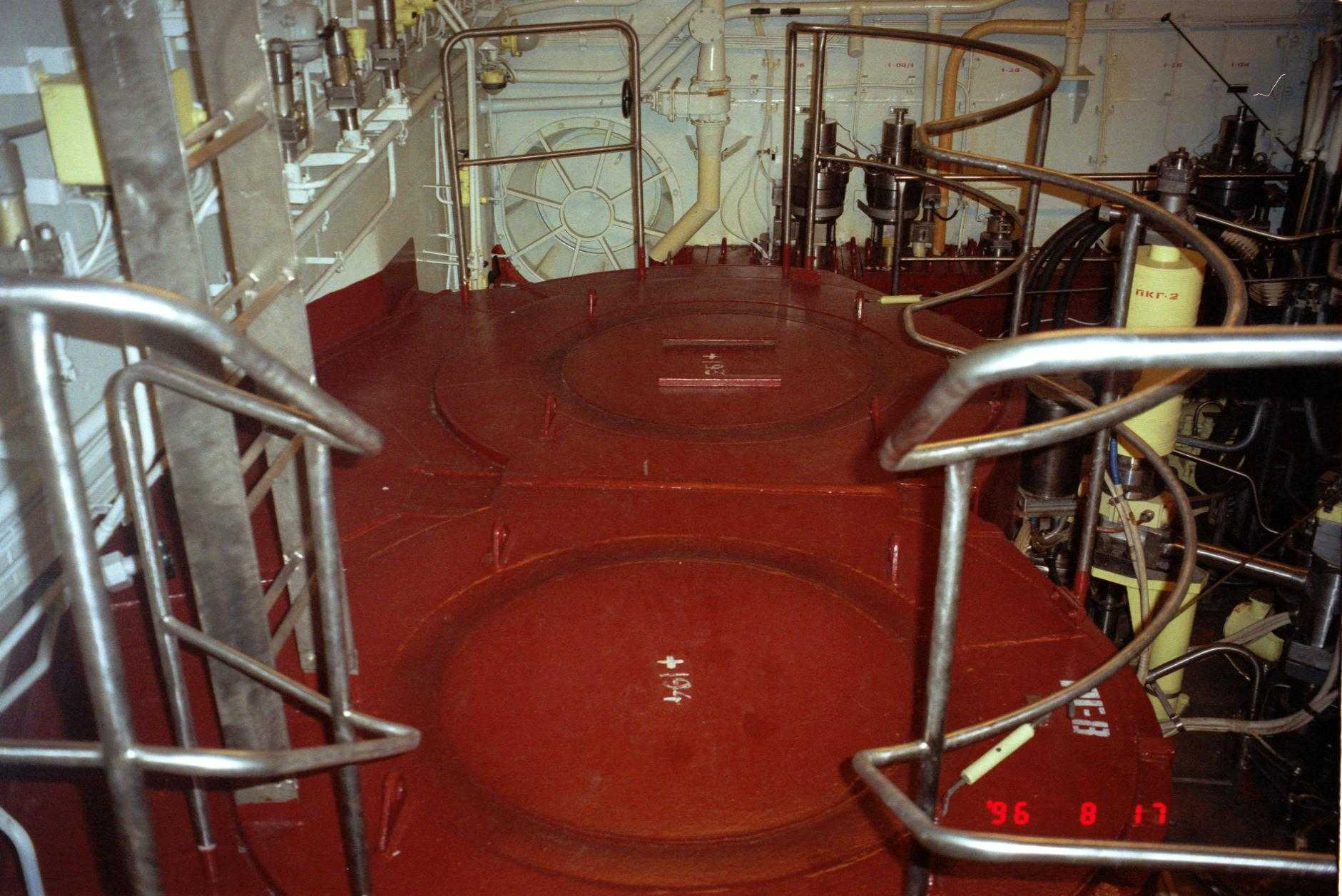 Атомный ледокол "Ямал". Реакторное отделение